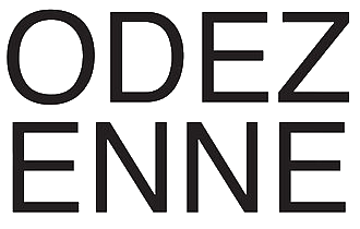 Odezenne